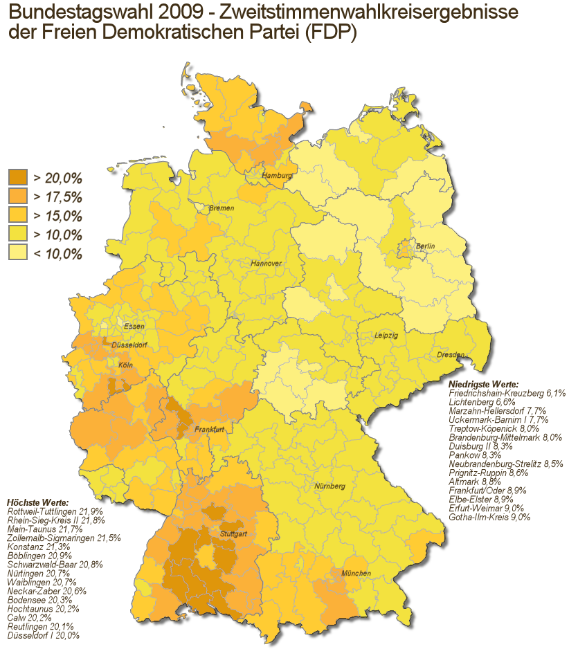 Zweitstimmenwahlkreisergebnisse FDP Bundestagswahl 2009